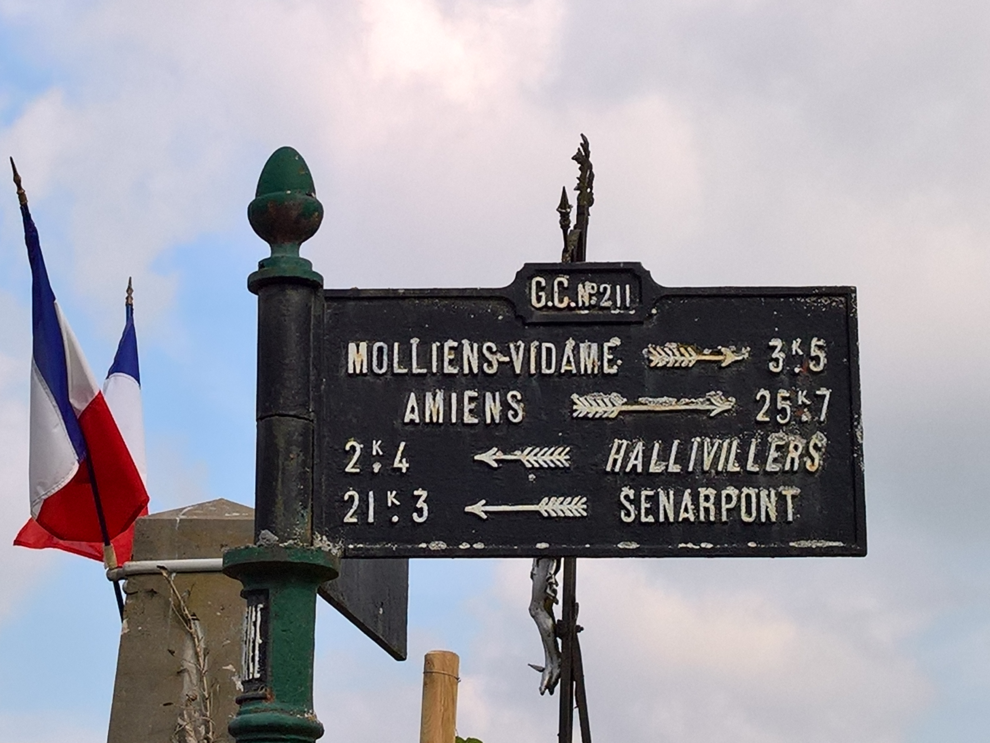 Camps-en-Amienois : Plaque de cocher